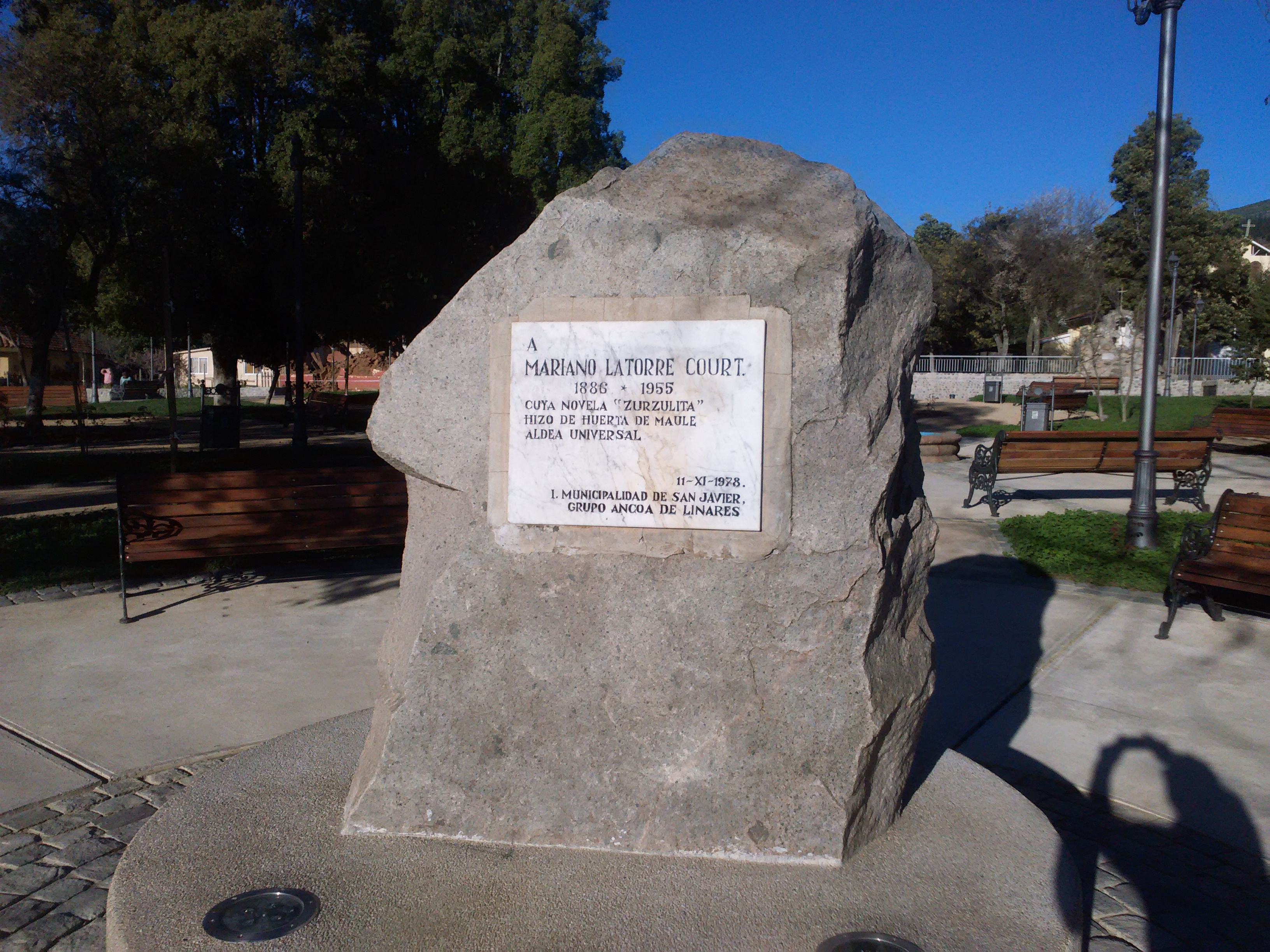 Imagen de la plaza de armas del pueblo de Huerta del Maule, VII regiòn, Chile.